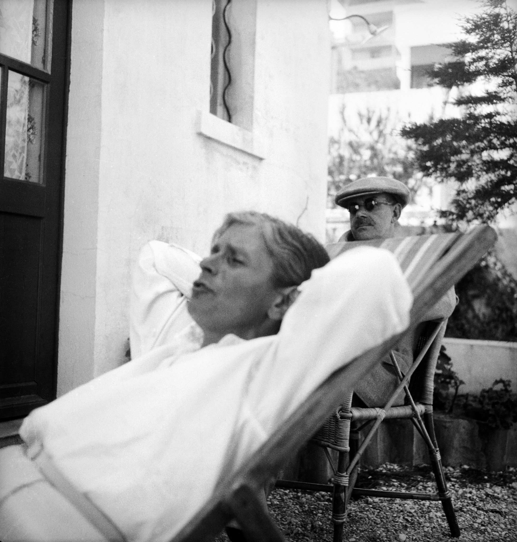 Frankreich, Lavandou: Menschen [Lokalisierung unsicher]; Katia und Thomas Mann